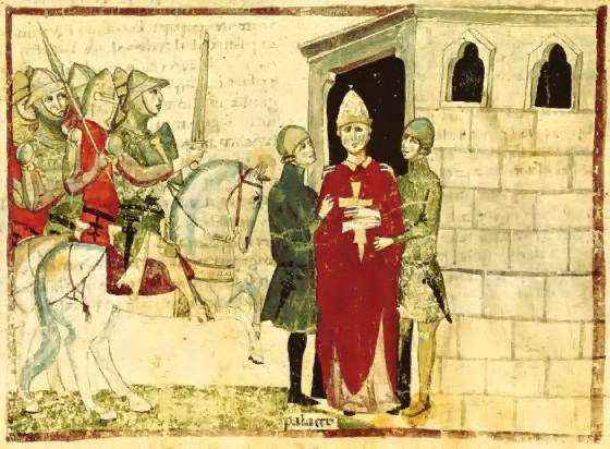 Bonifác VIII. ve vězení v Anagni